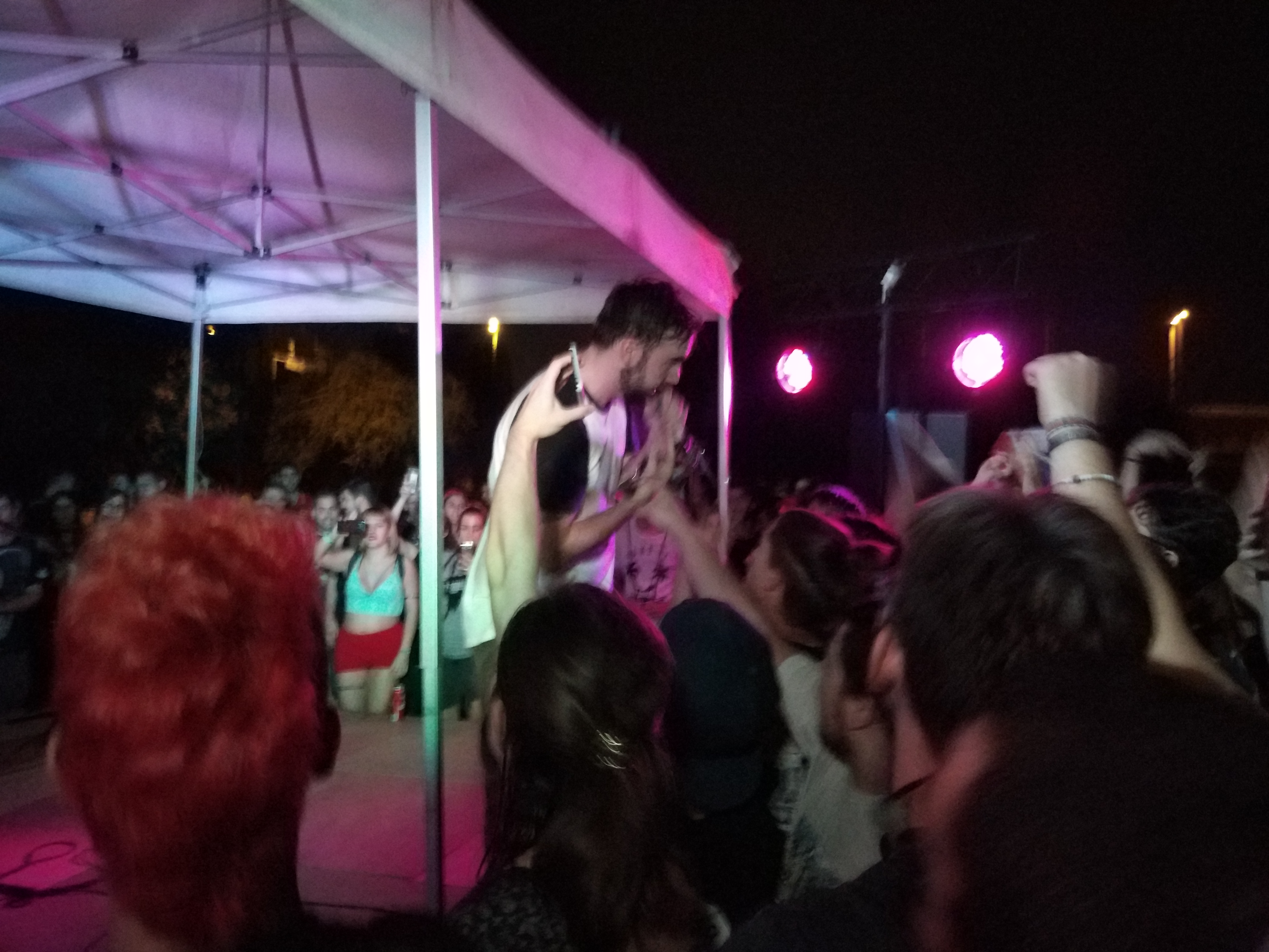 Sons of Aguirre Fotografía del concierto de Sons of Aguirre del 6 de octubre de 2017. MAE Festival, organizado por Movimiento de Acción Estudiantil